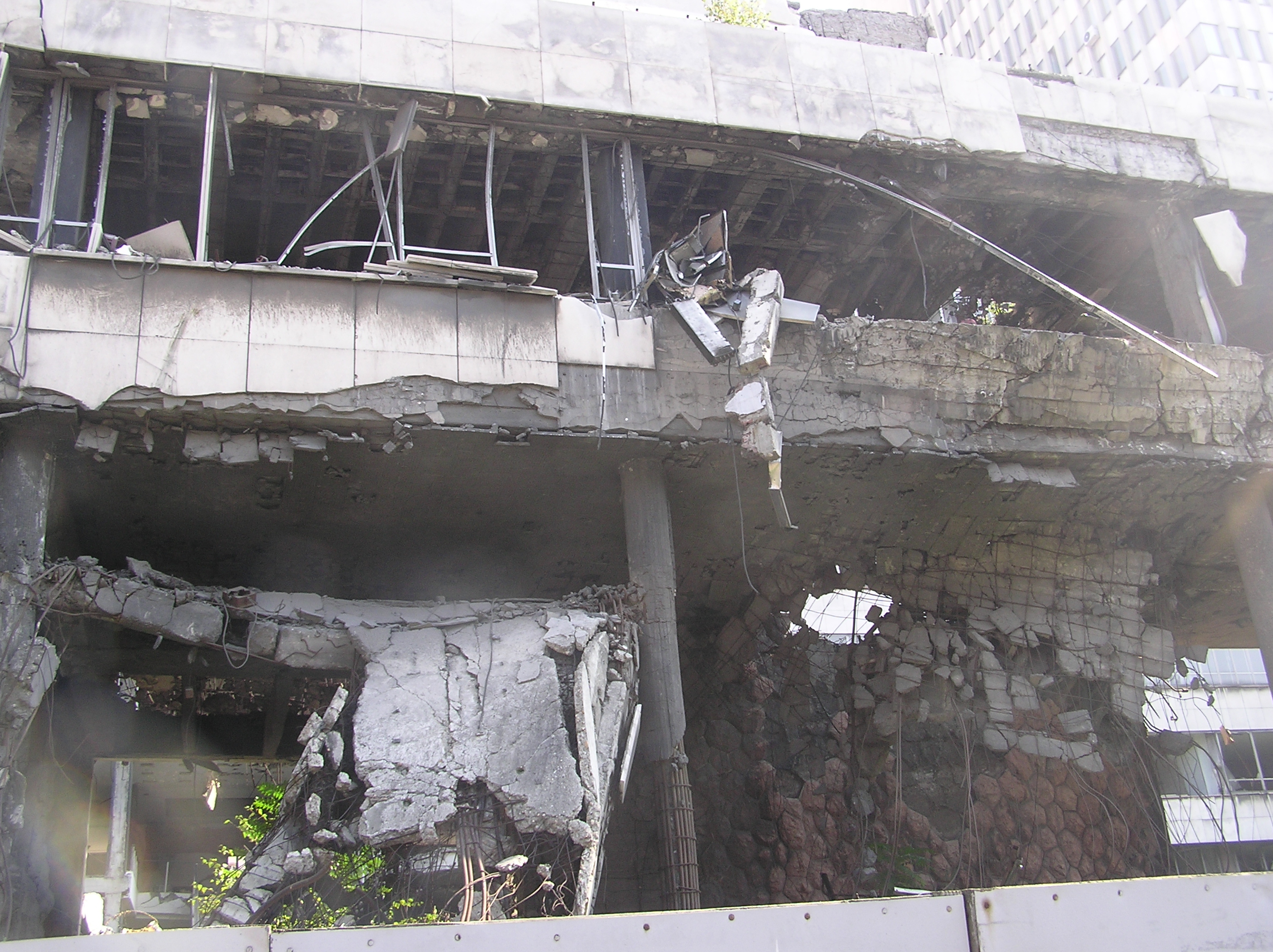 Зграде Генералштаба војске Србије и Црне Горе и Министарства одбране